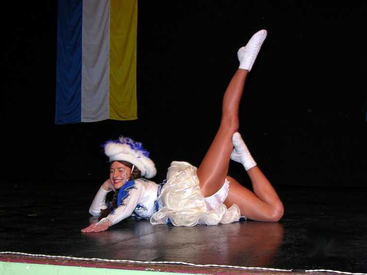 Das Bild stellt das Tanzmariechen der KVG Grünberg 1927 e.V. dar.